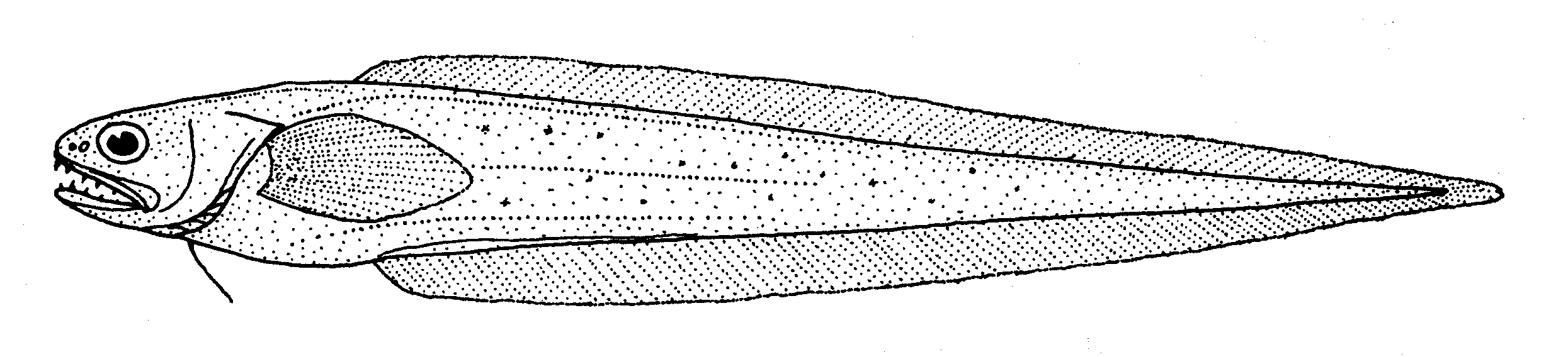 Pyramodon ventralis (no common name)